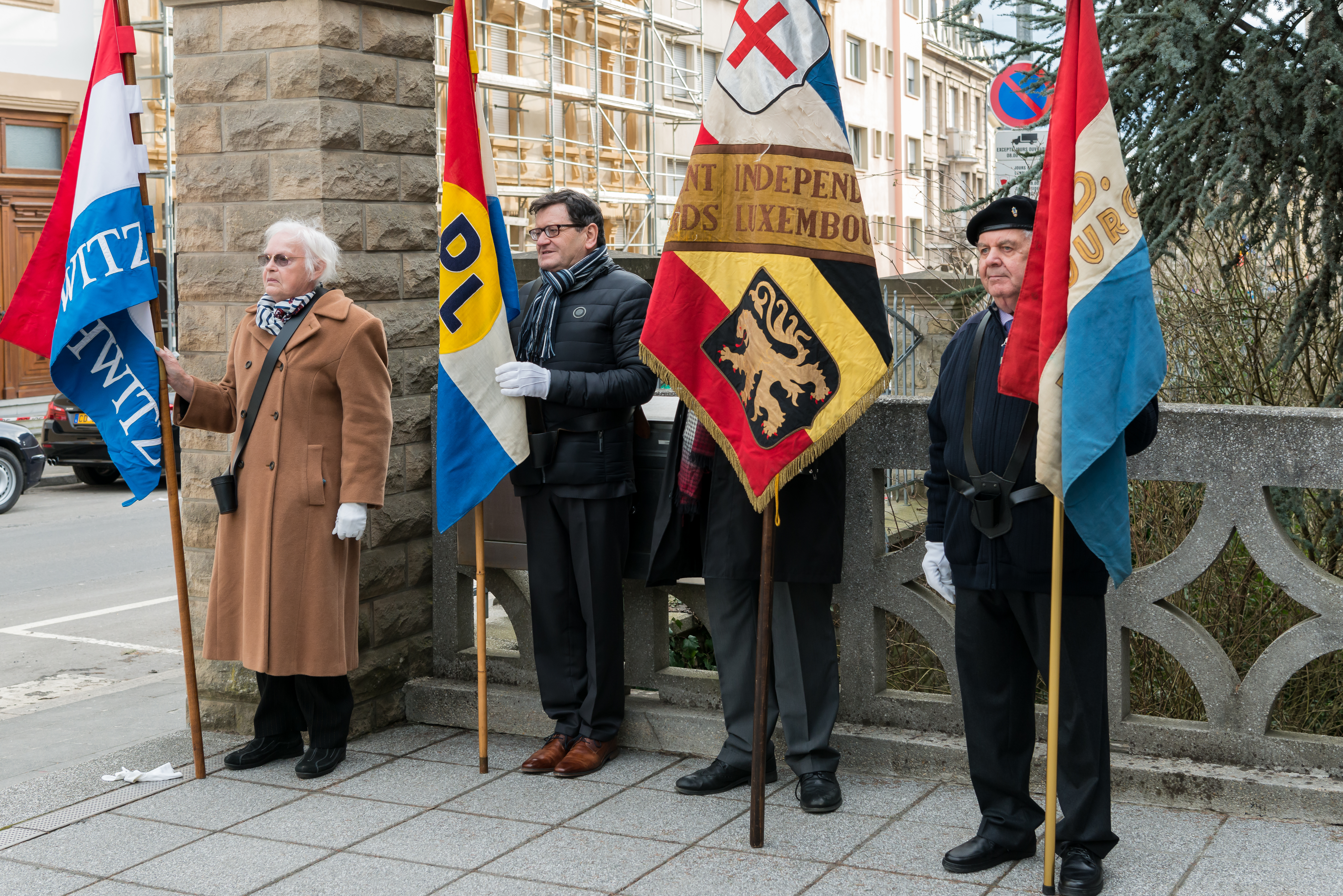 Um 27. Januar 2016, der Journée de la mémoire de l'Holocauste et de la prévention des crimes contre l'humanité, huet de Premier Xavier Bettel eng weider Erënnerungsplack un der Villa Pauly ageweit.D'Plack erënnert drun, datt an dësem Gebäi och Pläng fir d'Ermuerdung vun der lëtzebuergescher jüddescher Bevëlkerung vun der Gestapo ausgeschaftt goufen.Der feierlecher Zeremonie an der Villa Pauly hu Vertrieder vun den Ambassaden, de Chamberspresident Mars Di Bartolomeo, d'Stater Buergermeeschtesch Lydie Polfer, Deputéiert a Vertrieder vun der jüddescher Communautéit a vun der Zivilgesellschaft beigewunnt. D'Resistenzorganisatiounen an de Comité Auschwitz goufen duerch hir Fändeldréier vertrueden.Usprooche goufe vum Haushär, dem Historiker Paul Dostert, dem President vum Stater Consistoire Claude Marx a vum Premier gehalen.